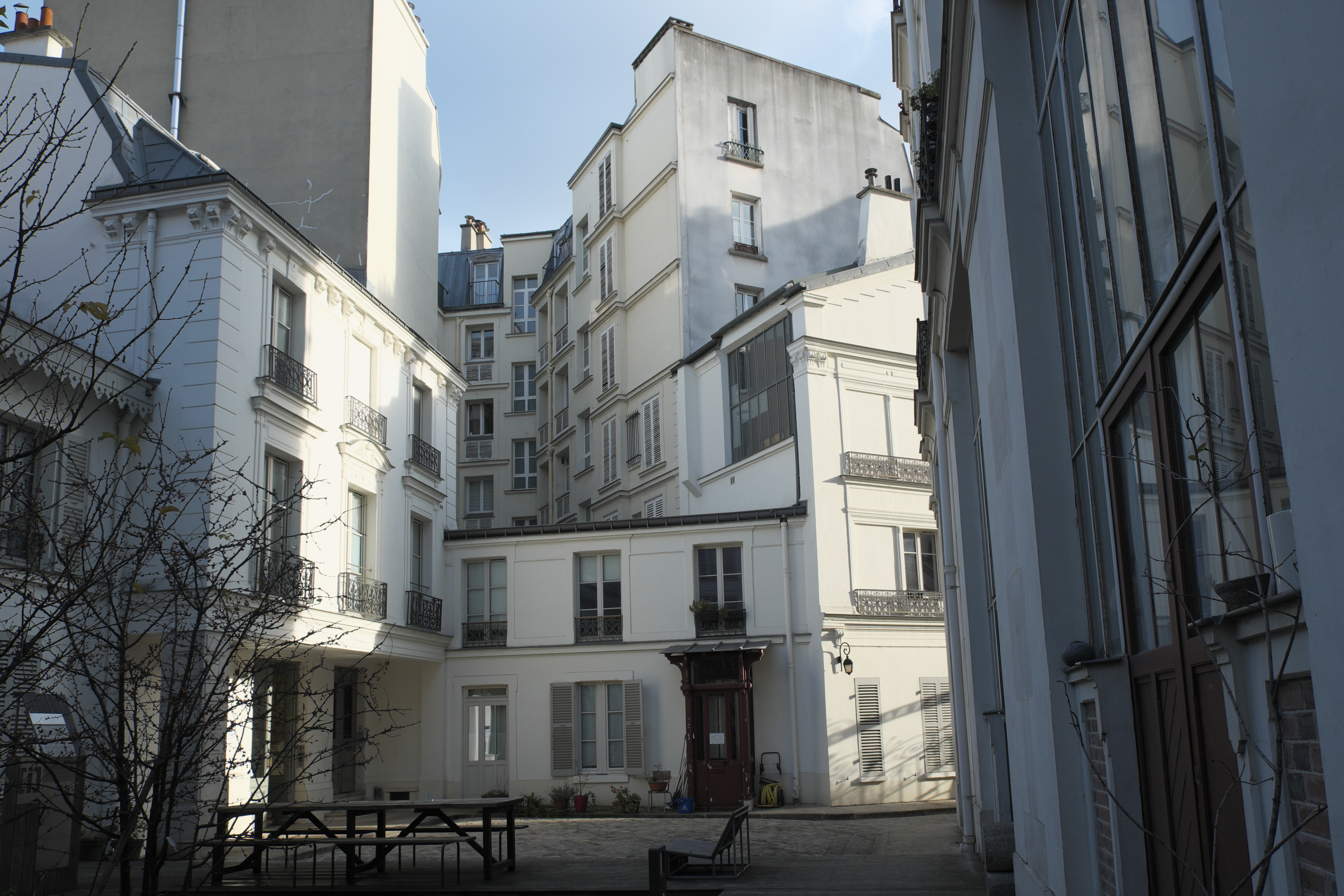 Villa des Arts im 18. Arrondissement in Paris (Île-de-France/Frankreich)